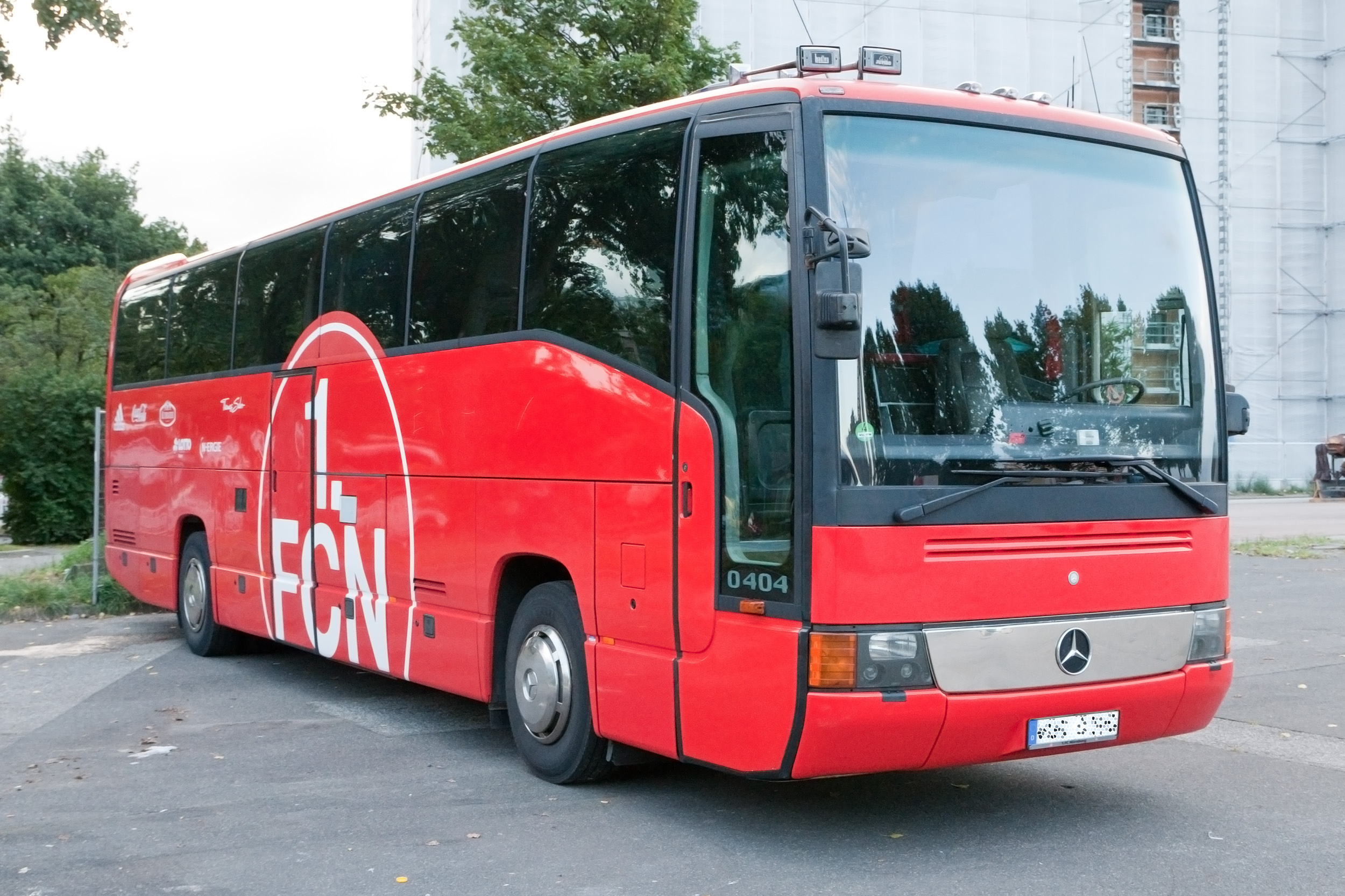 Mannschaftsbus des 1. FC Nürnberg. Fotografiert in Hamburg.